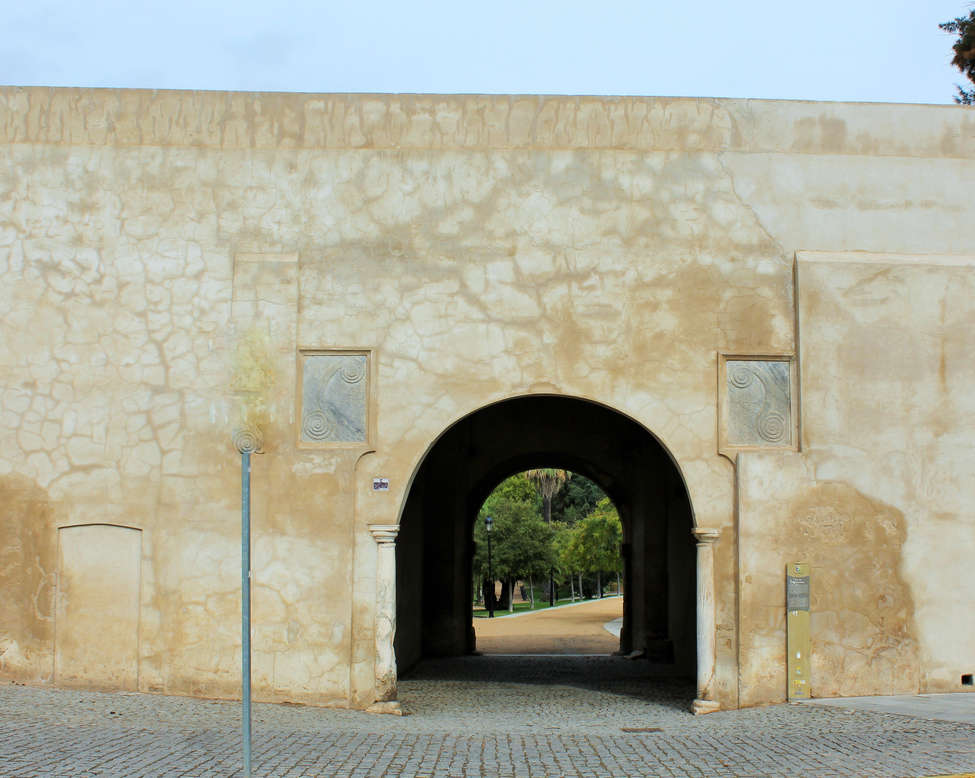 Fachada exterior